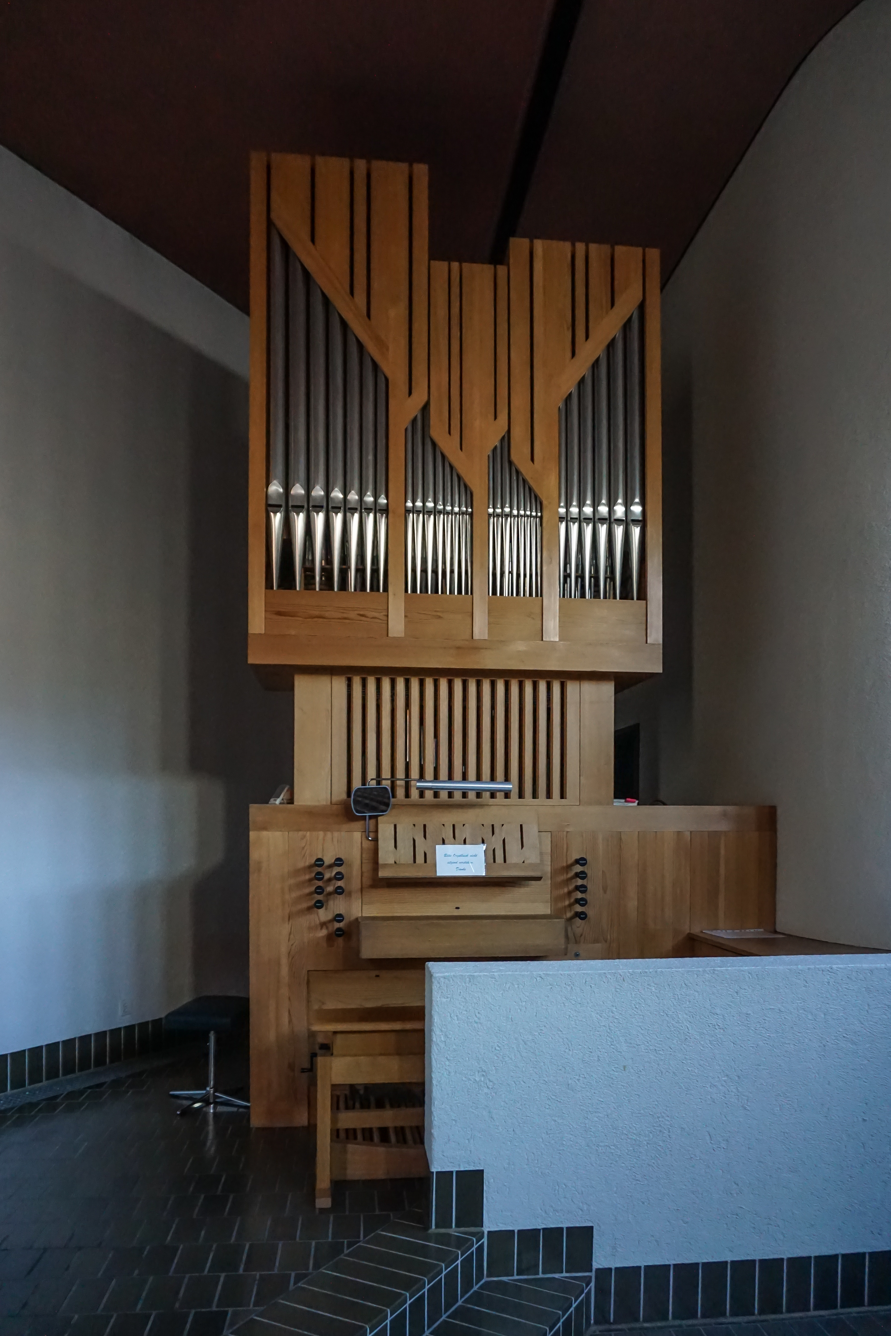 Oekumenisches Zentrum St. Andreas in Kehrsatz, Orgel